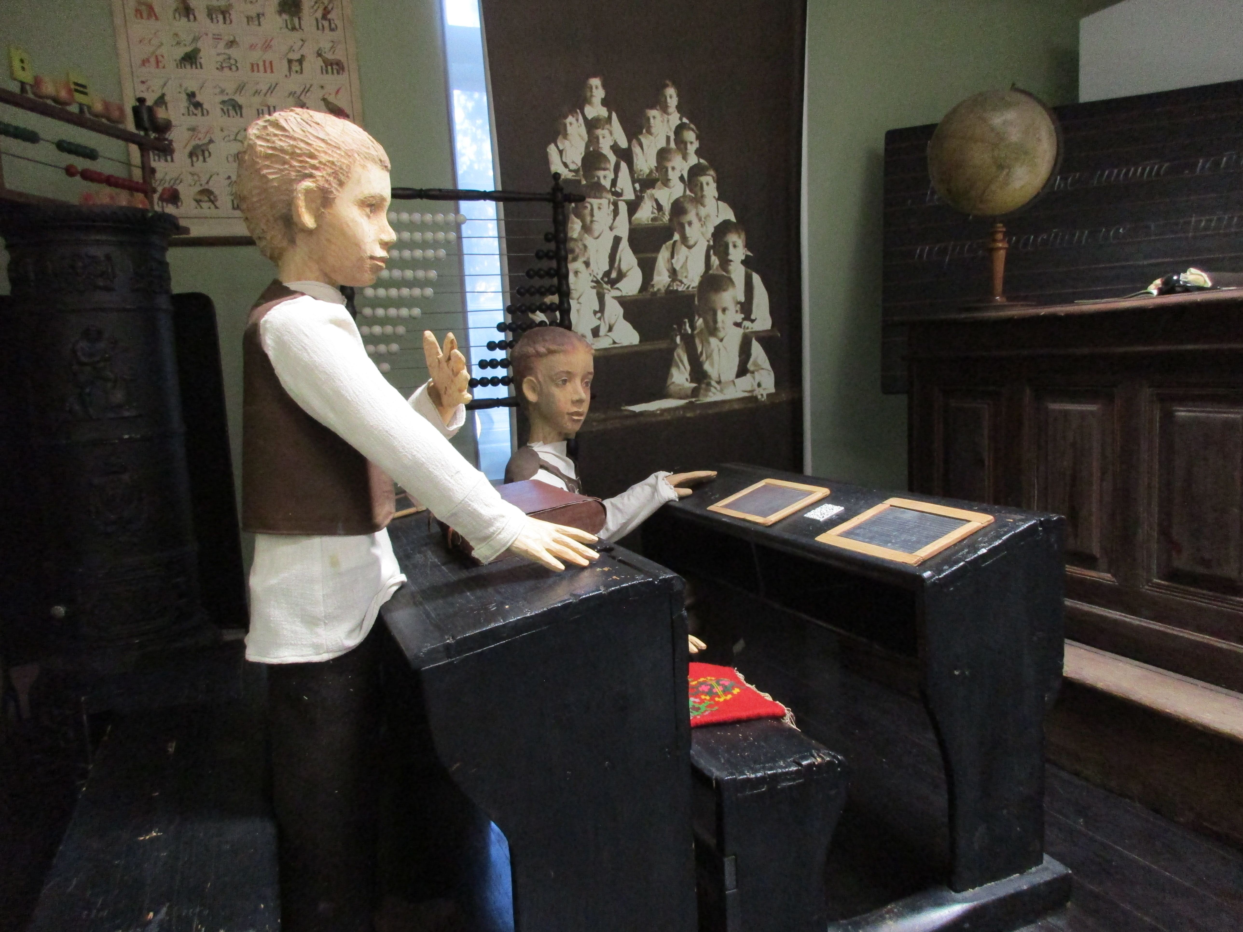 Srpski (latinica): Pedagoški muzej, Beograd